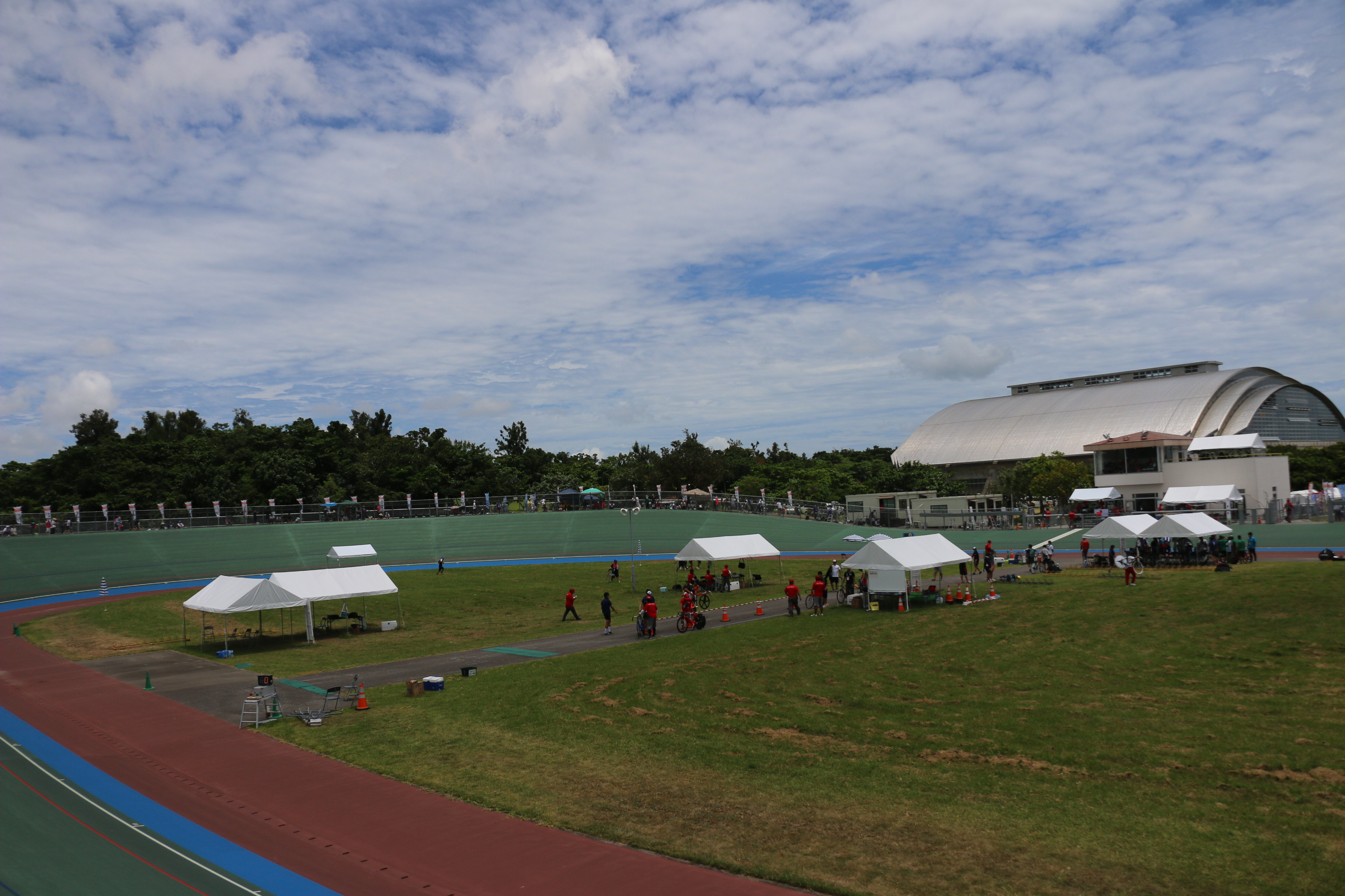 沖縄県総合運動公園自転車競技場。3コーナーから1コーナー方向を臨む。2018年8月1日撮影。